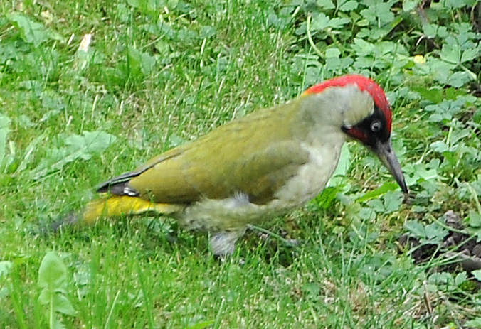 Grünspecht